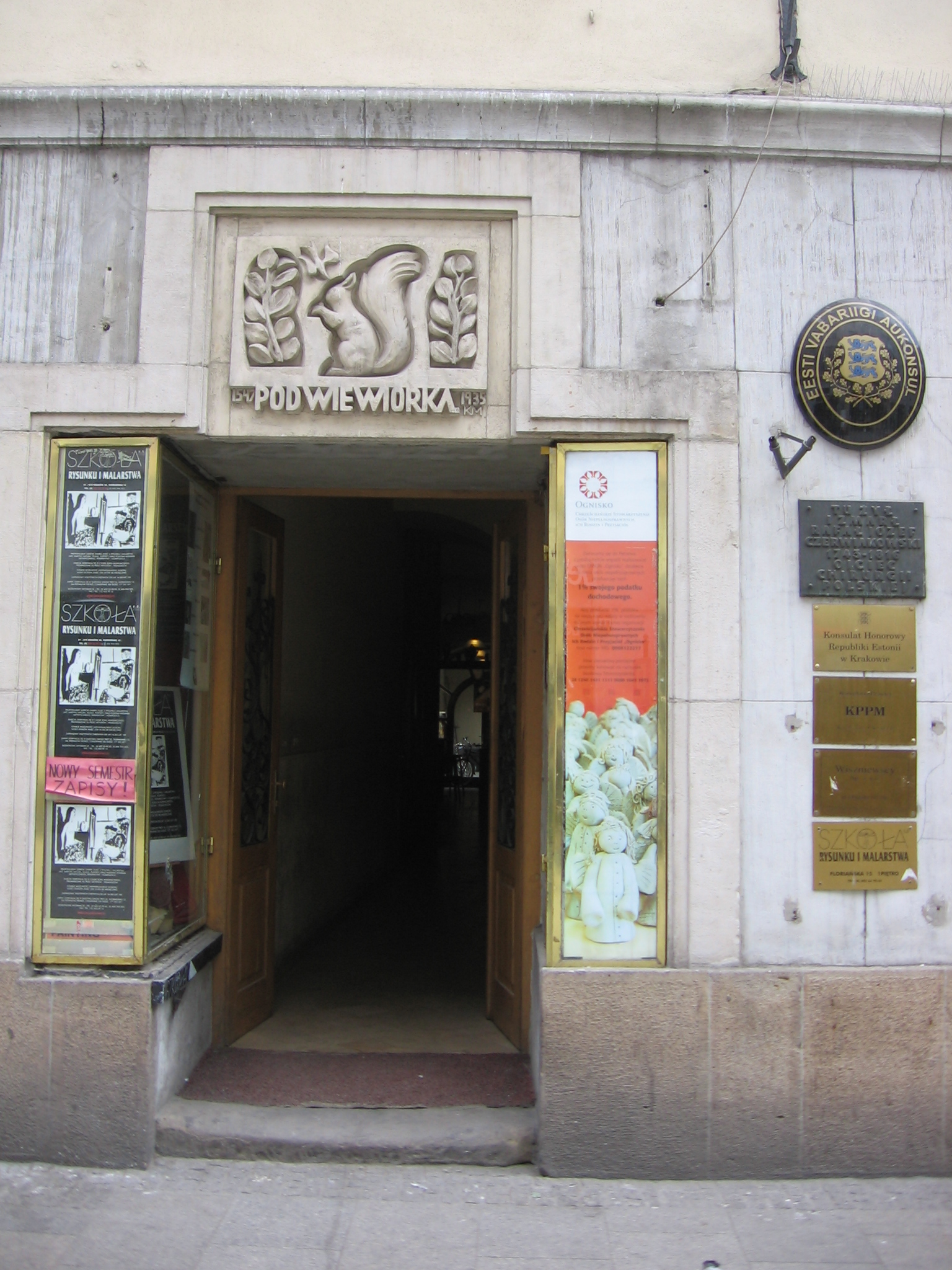 Kraków, ul. Floriańska 15 - wejście do kamienicy Pod Wiewiórką (zabytek nr A-381)